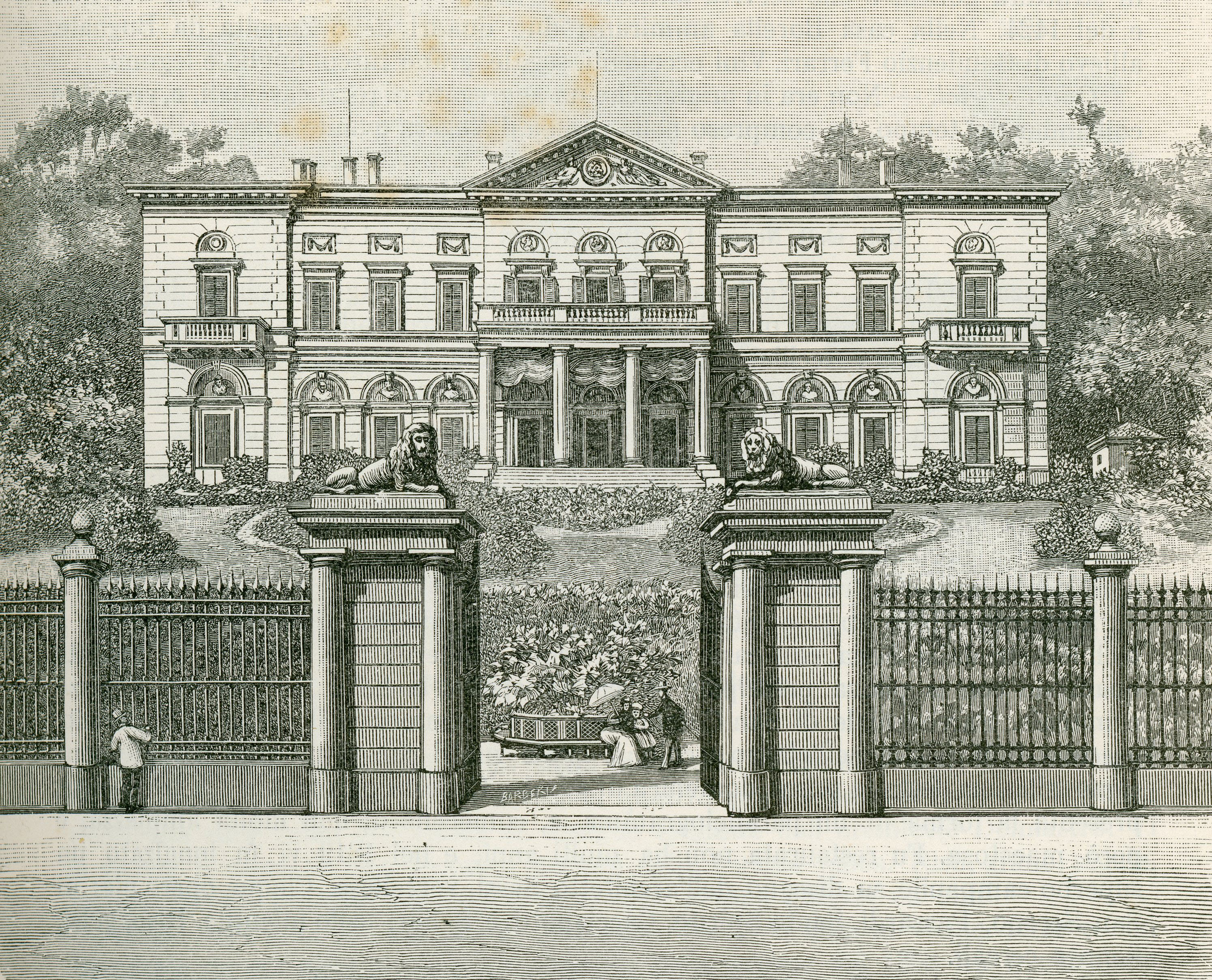 Villa Farraggiana a Meina sul lago Maggiore, (xilografia di Barberis).